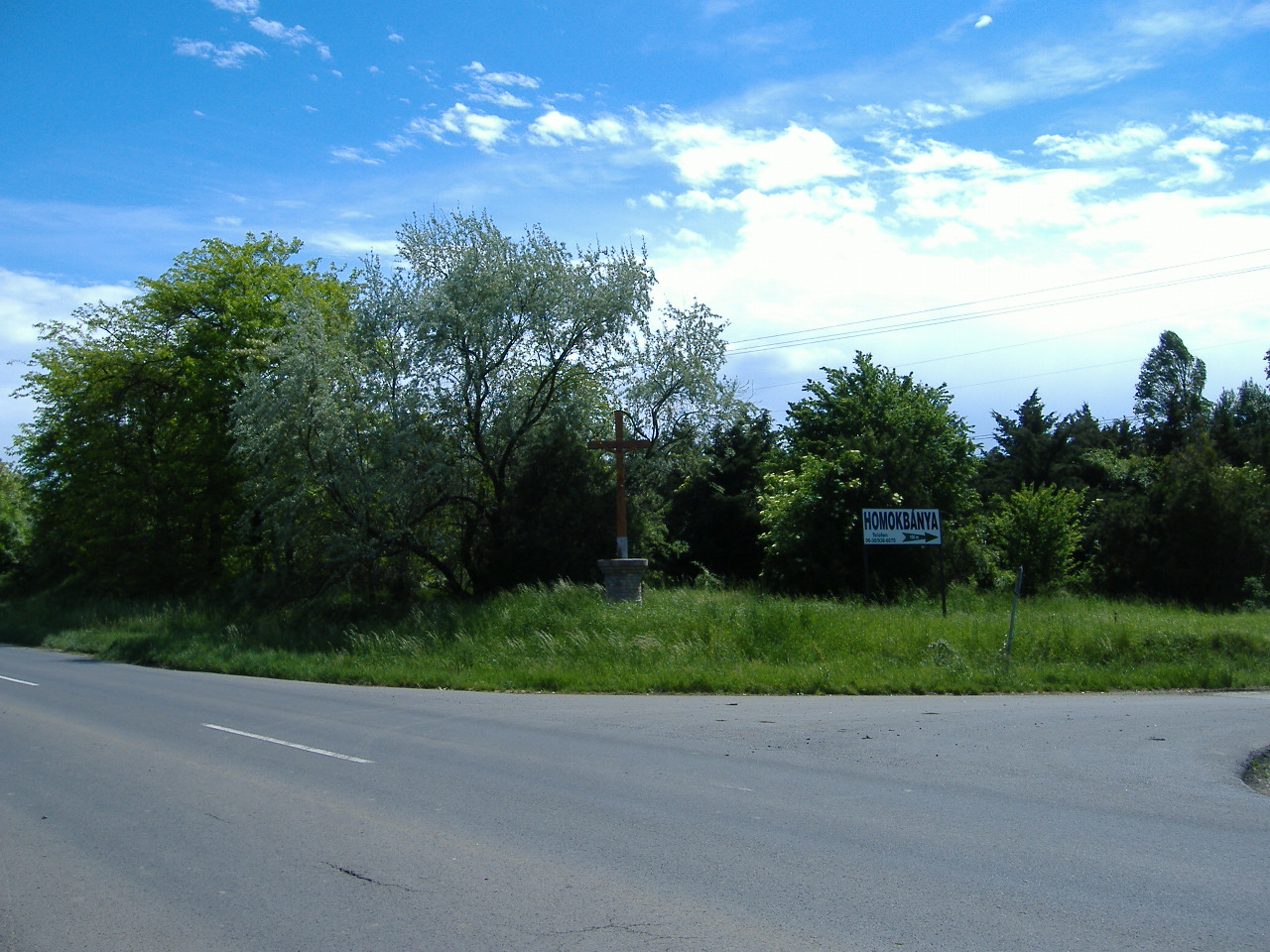 A Pozderka-halom Törökszentmiklós mellett (ennyi látszik belőle az útról)